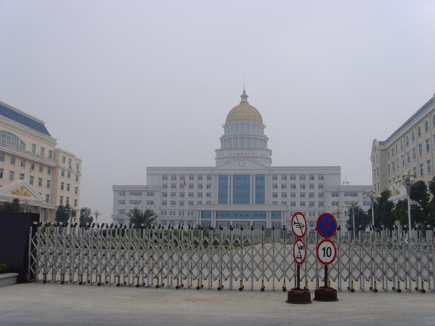 江西外语外贸职业学院正门